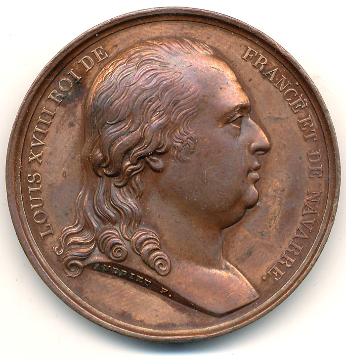 Louis XVIII, Représentation signée Andrieu de la scéance solennelle de la promulgation de la Charte Constitutionnelle du 4 juin 1814. Médaille en cuivre, 41mm, Avers